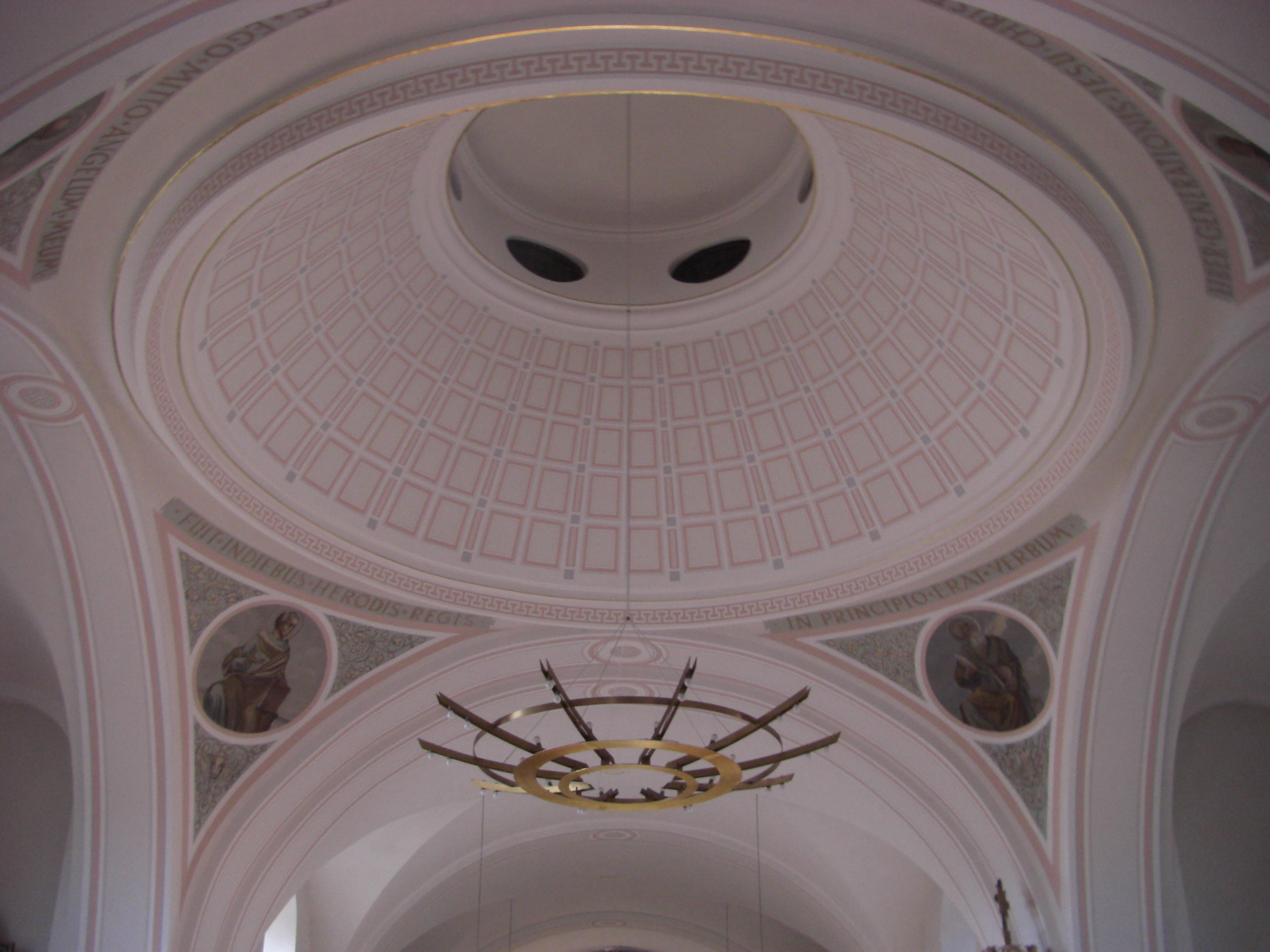 Kuppel von St. Goar (Flieden)